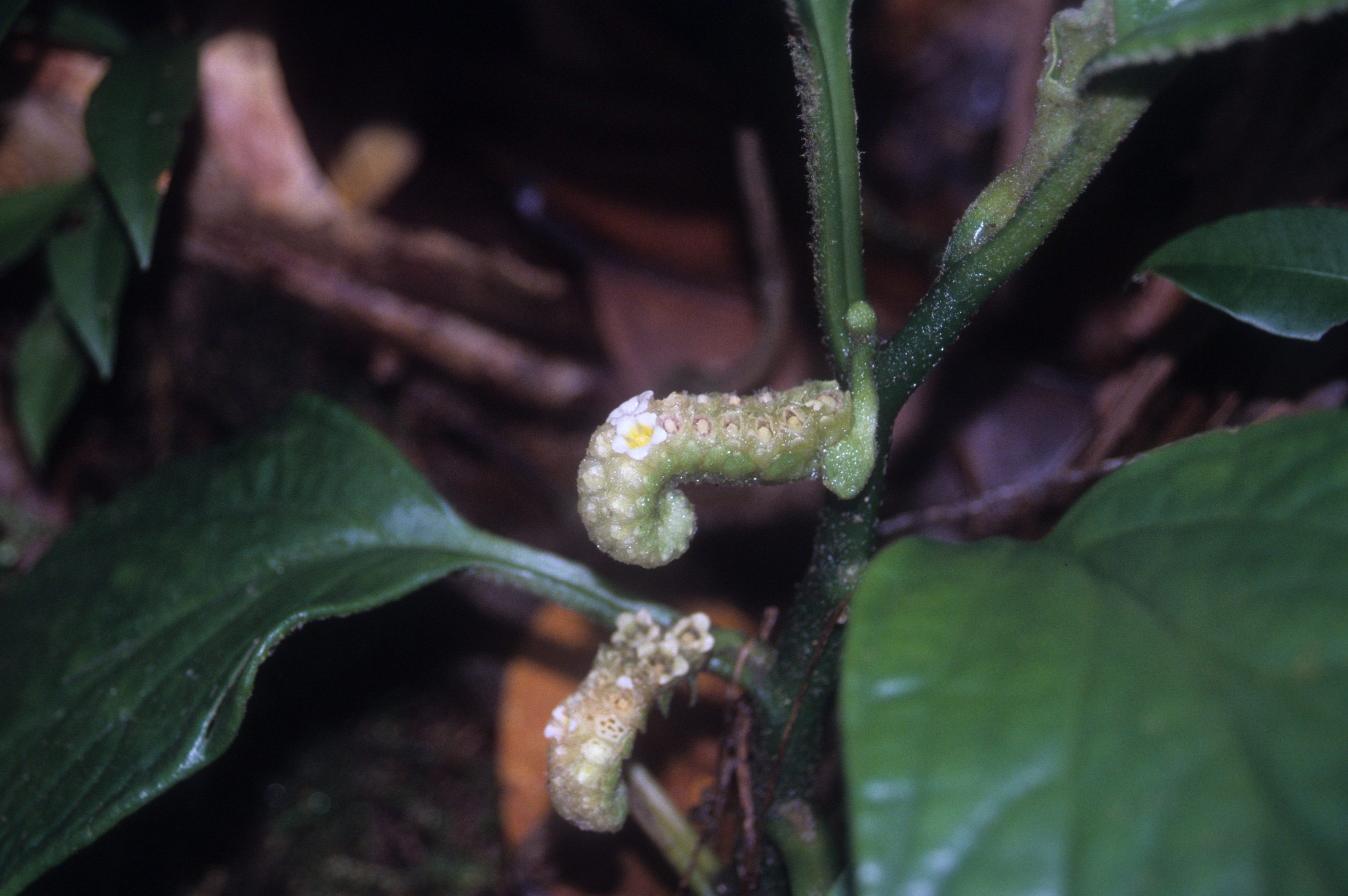 Lata Cemerung, Terennganu, Malaysia. Oct 2002. from slide.